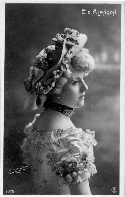 Emilienne D'Alencon, franz. Tänzerin, Aufnahme von ca. 1902